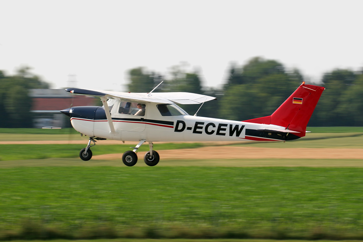 Augsburg Airport (EDMA/AGB)